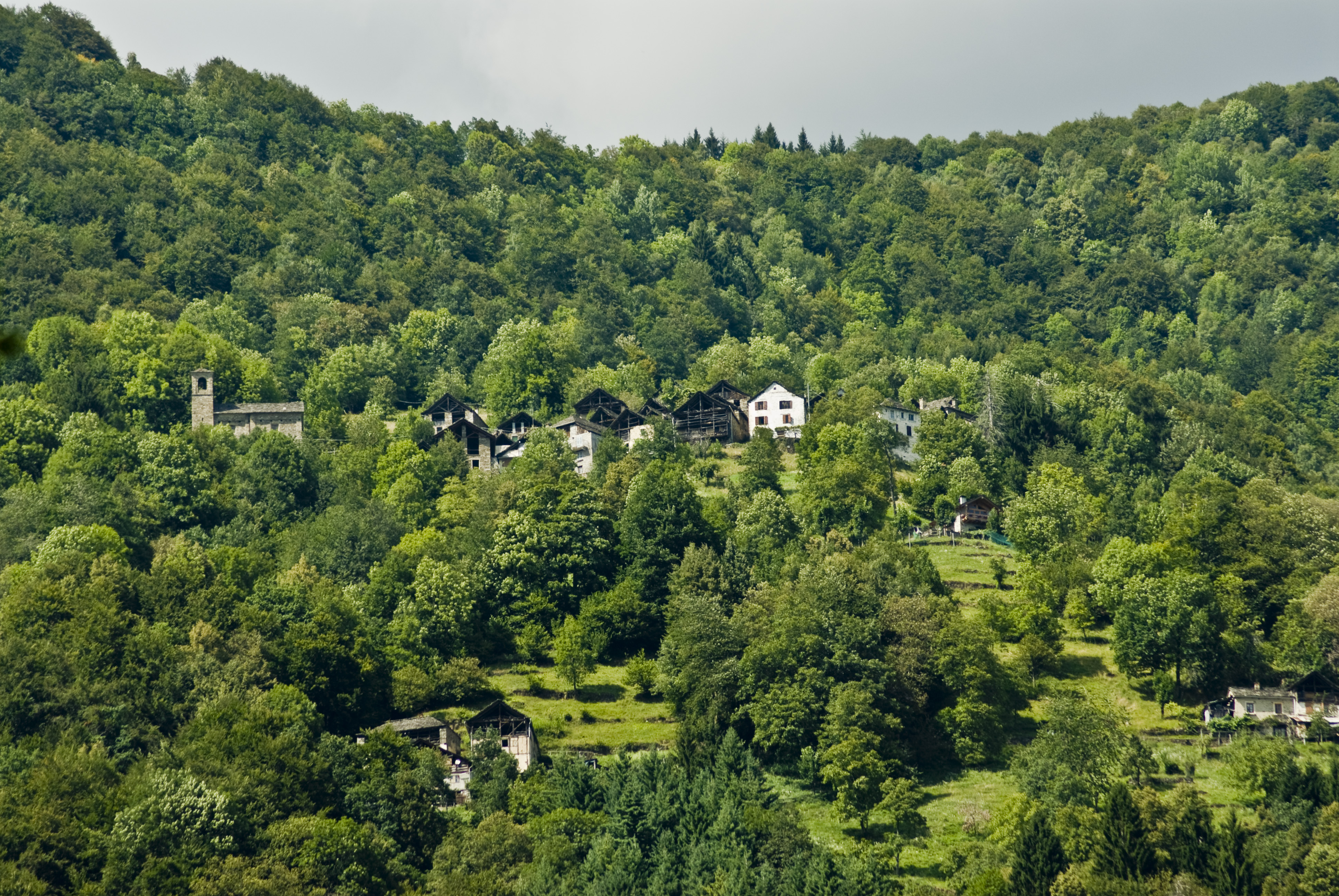 Vista panoramica della Piana di Rossa